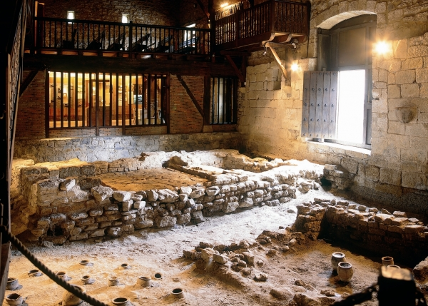 Irun heeriko Oiasso Museotik gertu dagoen, Ama Xantalen ermitako barrualdea